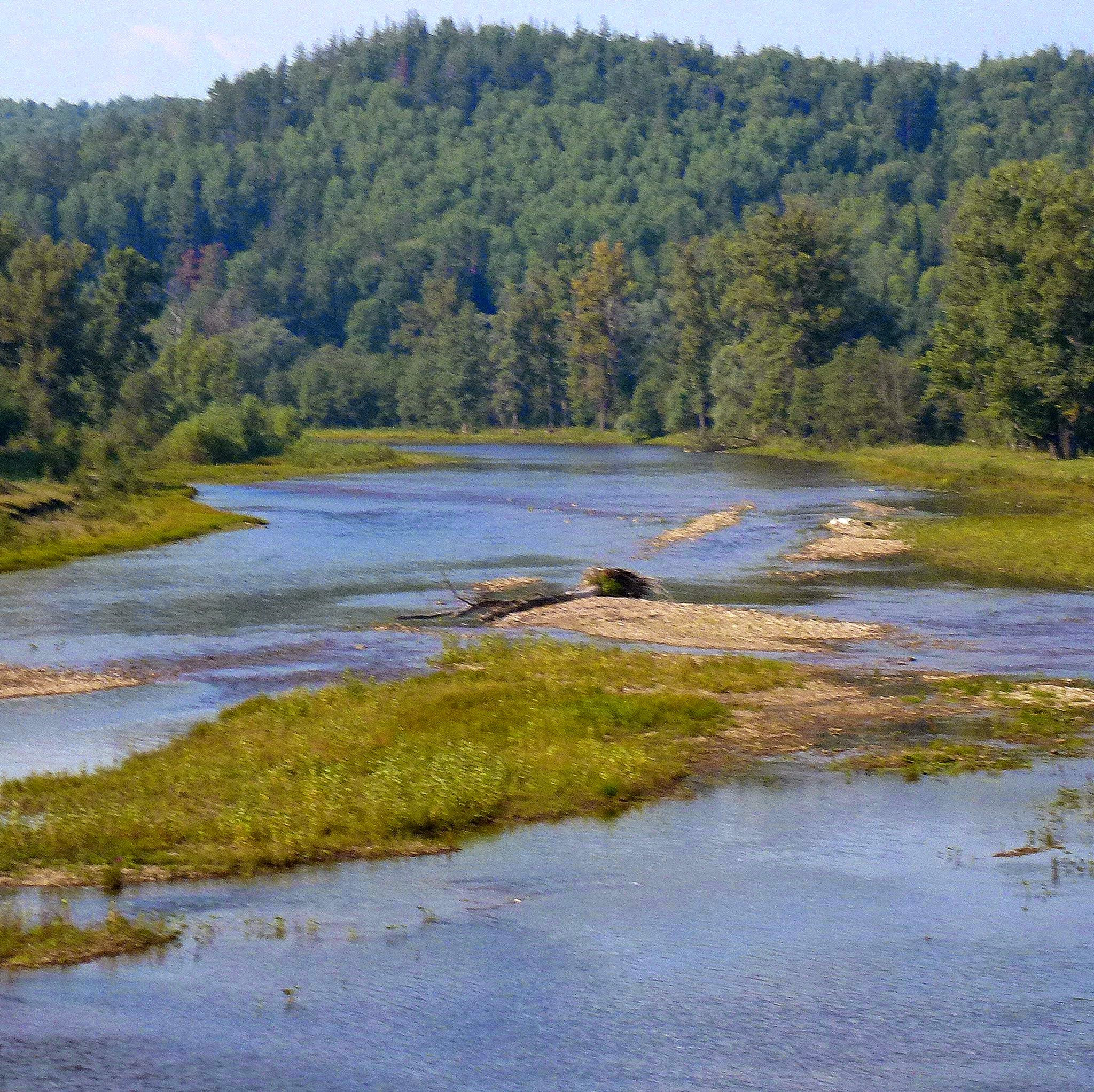 Река Большой Инзер, Усмангали, Башкортостан